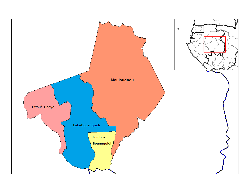 オゴウェ・ロロ州（Ogooué-Lolo）の県（Departement）の地図。ガボン2013年国勢調査の資料に基づく：[1]